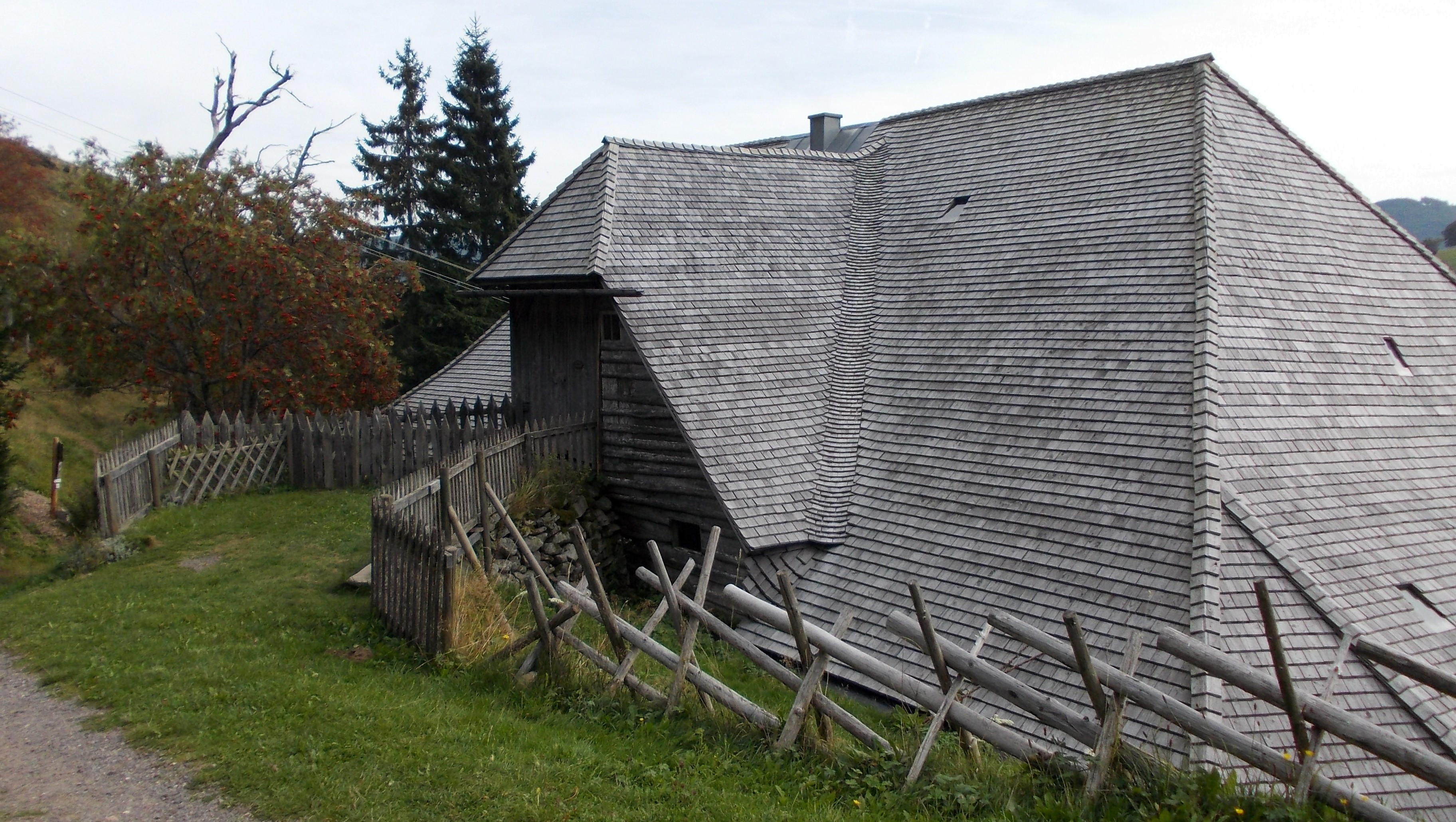 Bauernhausmuseum Schniederlihof